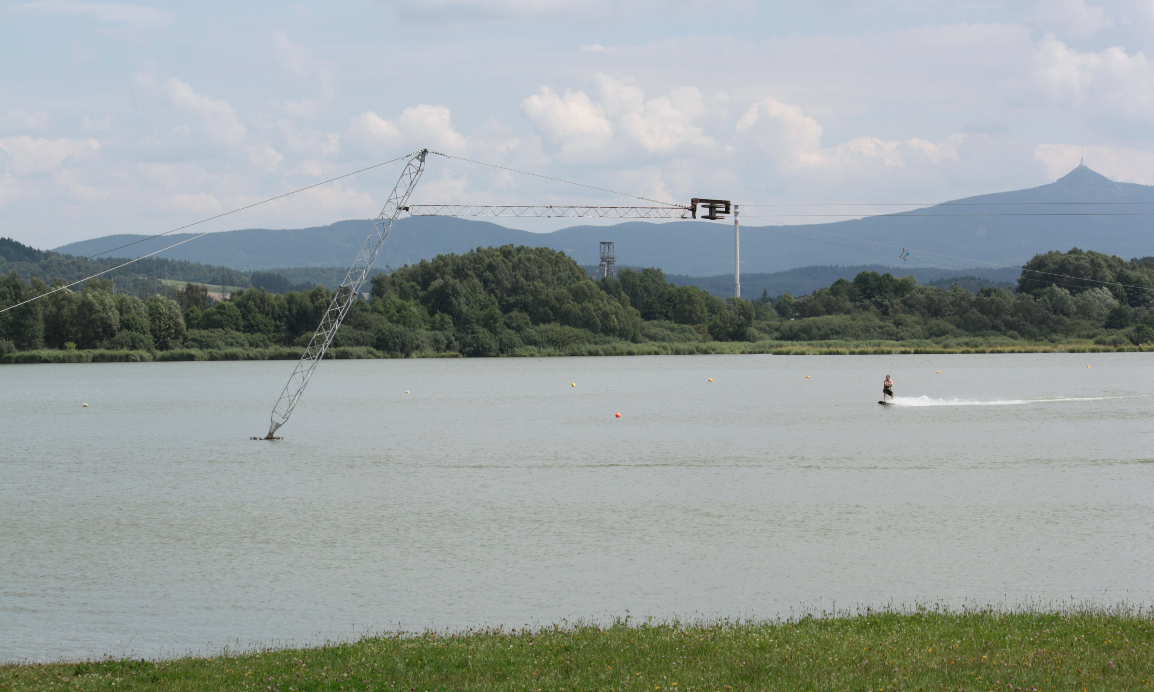 Česky: Stráž pod Ralskem, lyžařský vlek na vodní nádrži Stráž pod Ralskem